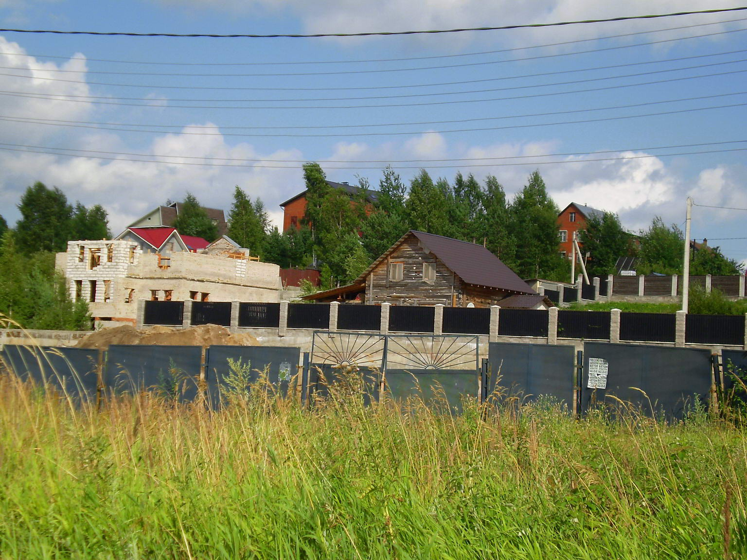 Деревня Кальтино